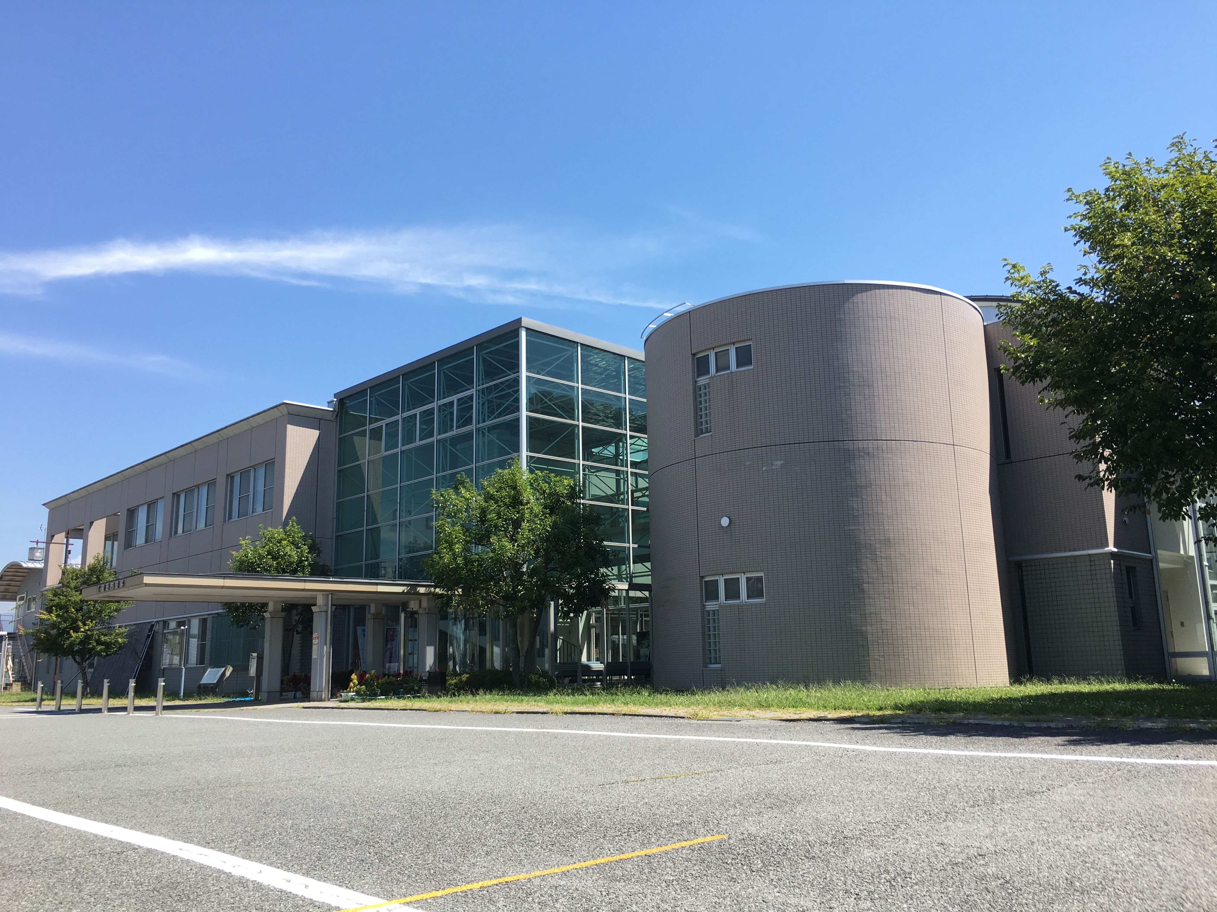 豊丘村役場